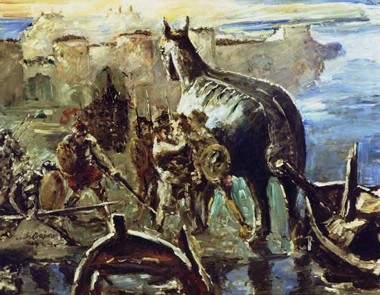 Trojanisches Pferd